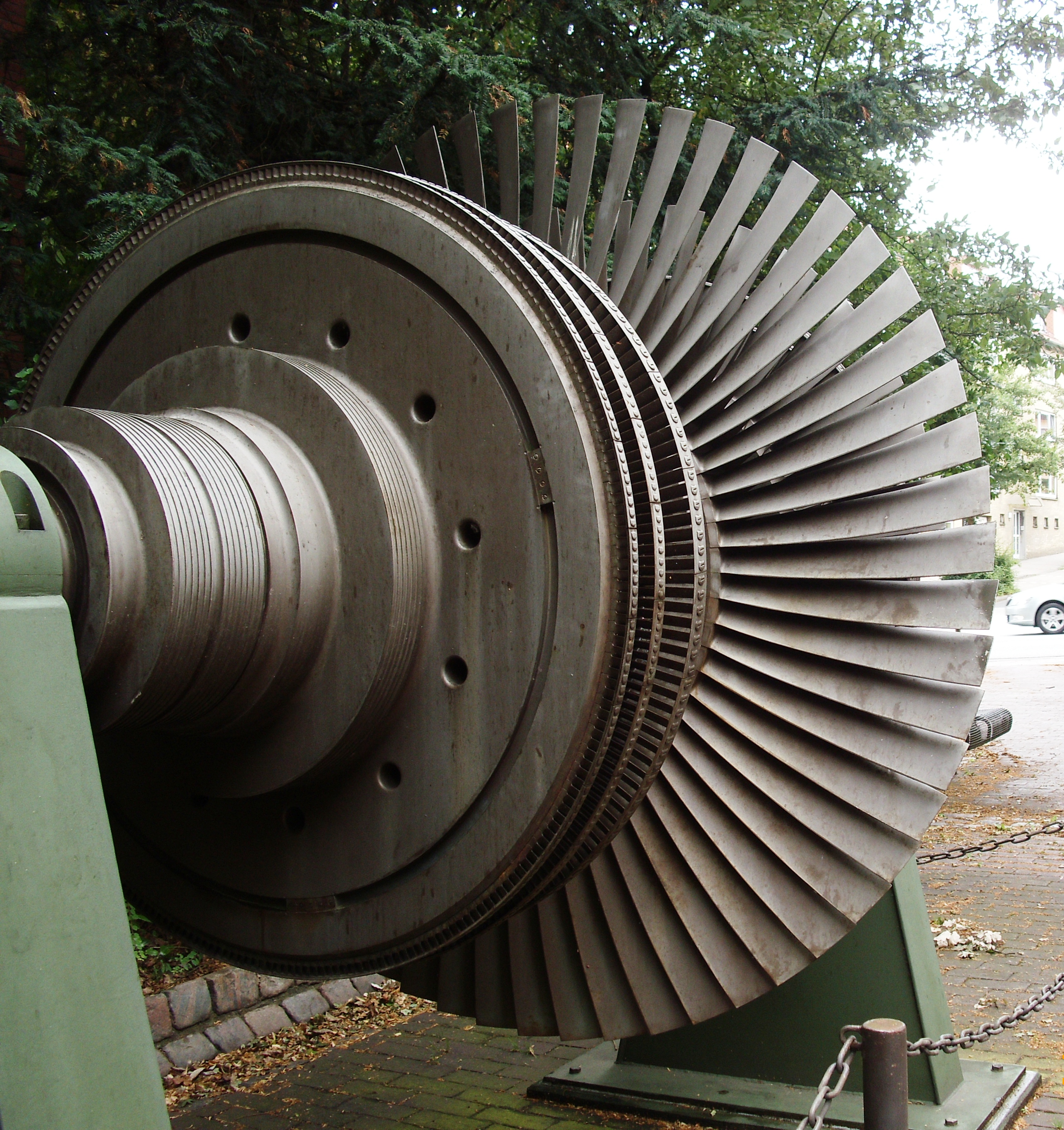 Rotor einer Schiffsdampfturbine